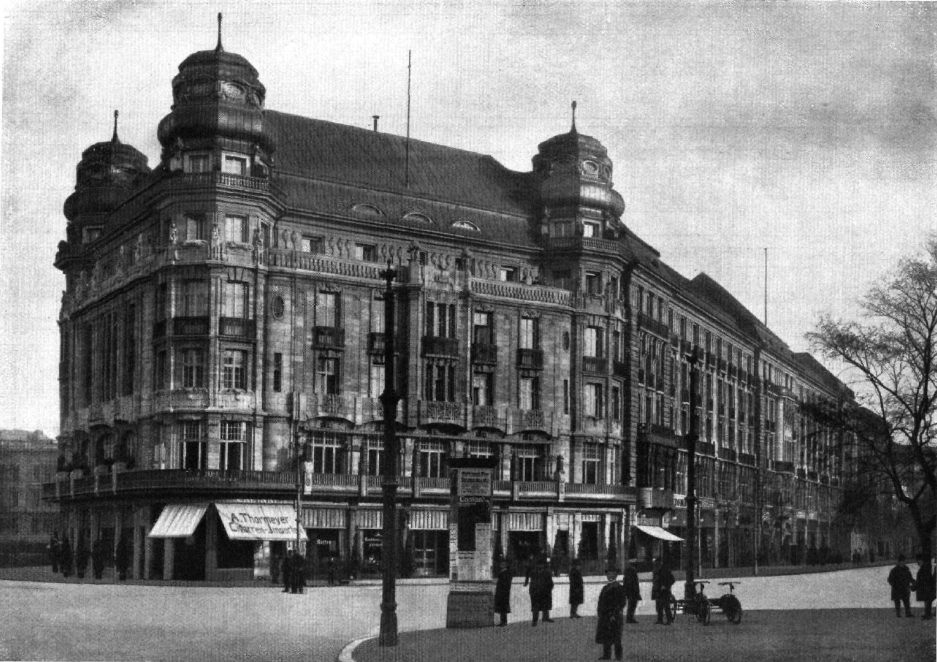 Ansicht des 1906-1907 neuerrichteten Berliner Hotels "Fürstenhof". Aufnahme wahrscheinlich von 1908.